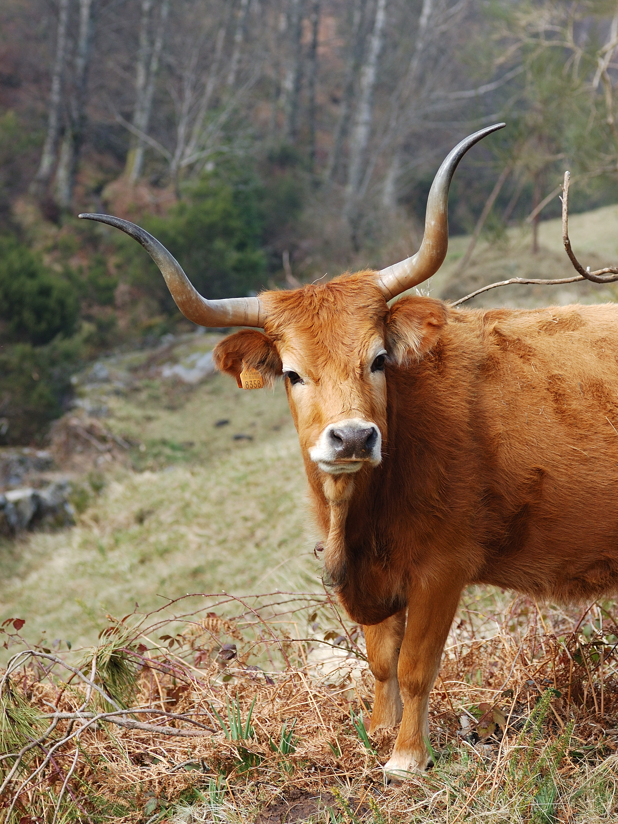 Sistelo, Portugal [2009]